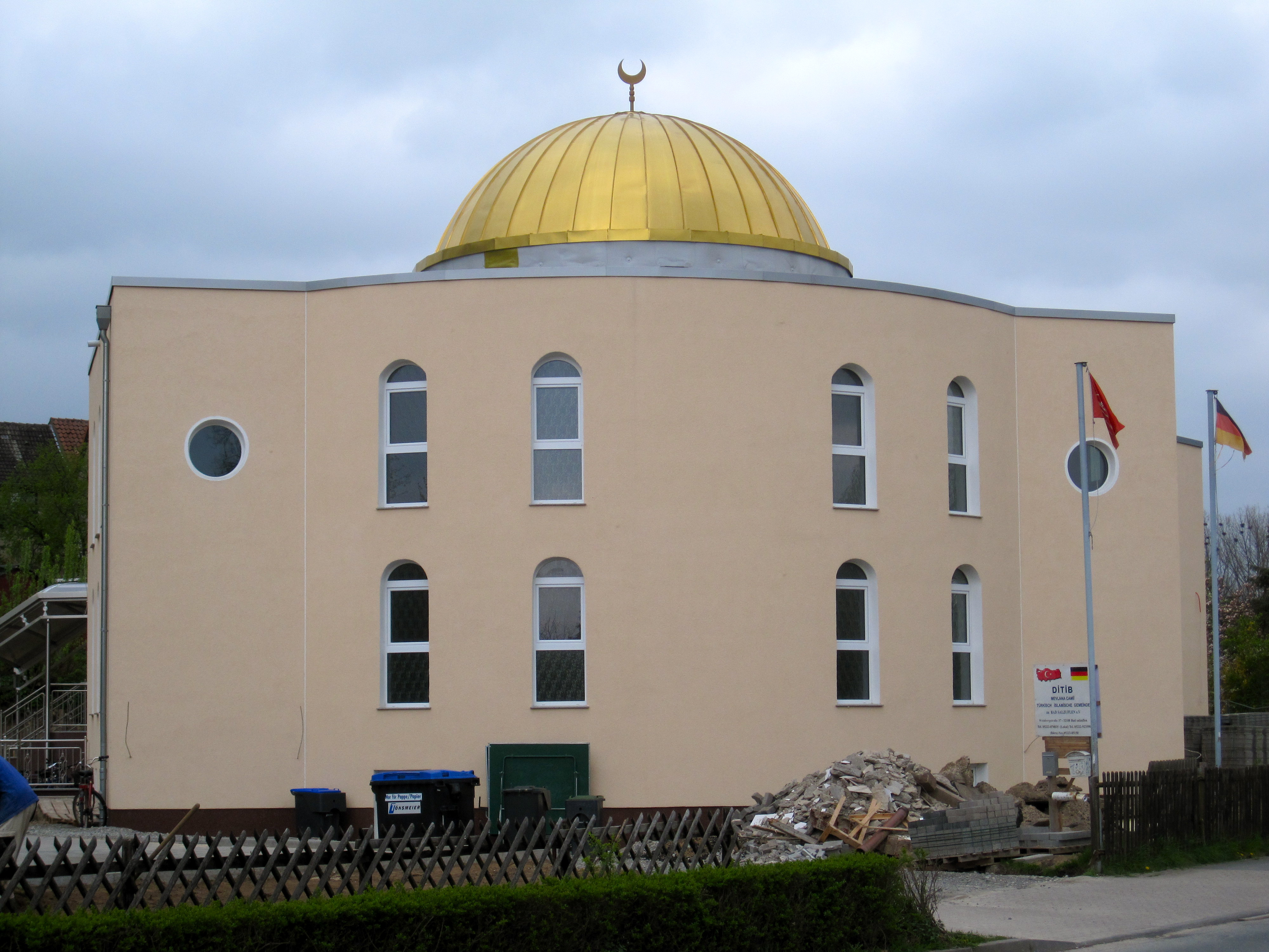 DITIB Moschee in der Weinbergstraße in Bad Salzuflen